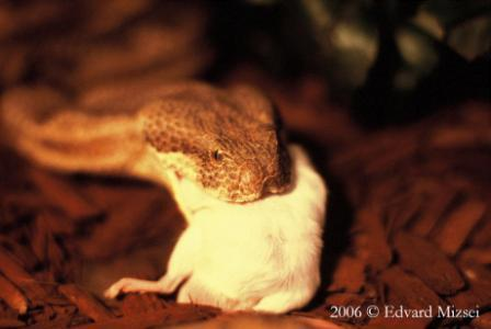 Marokkói vipera (Macrovipera mauritanica)